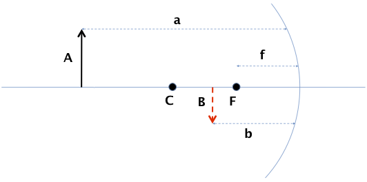 Avstånd och storlekar gällande avbildning i sfäriska speglar